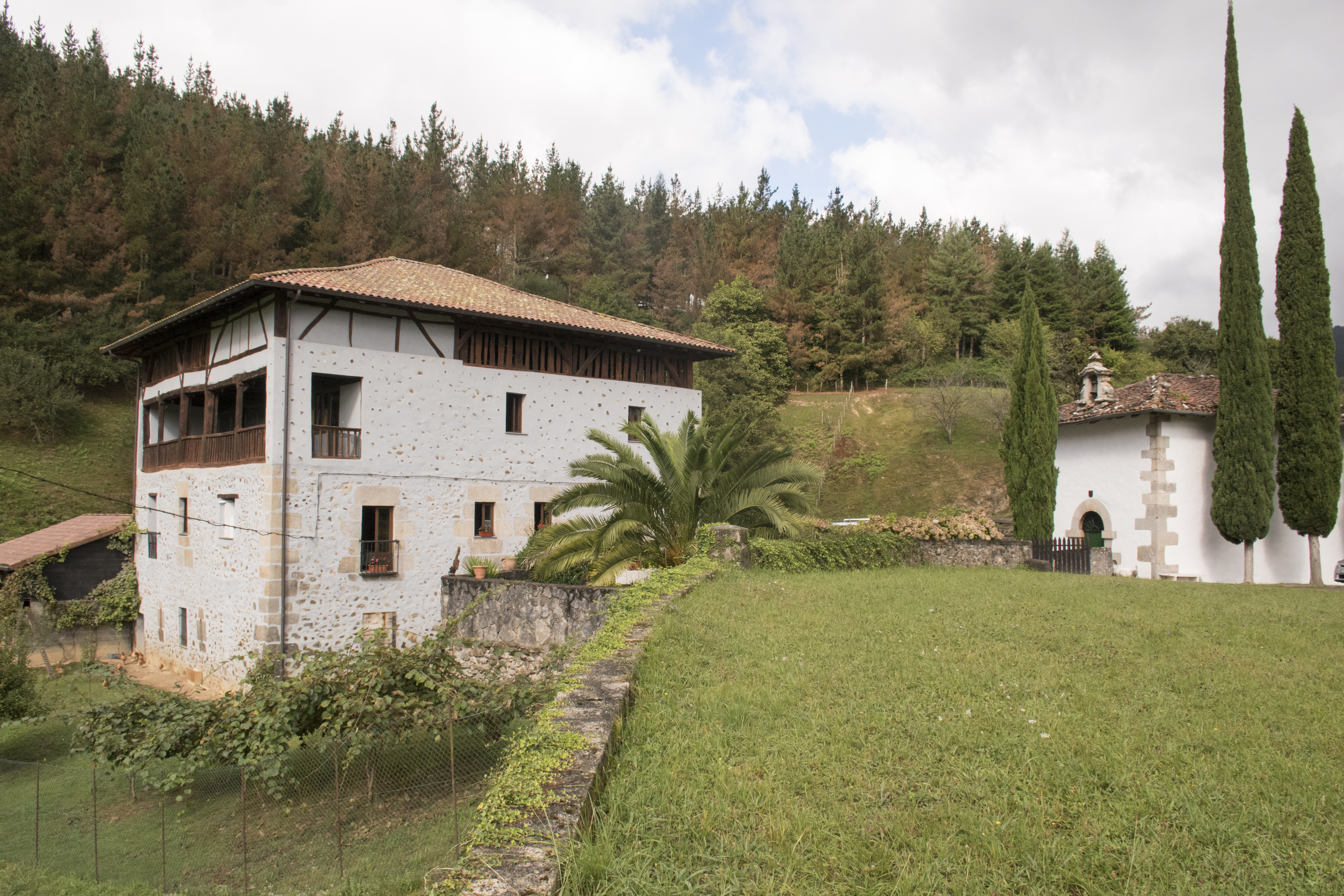 Egurbide Burdinola eta Errota multzoa